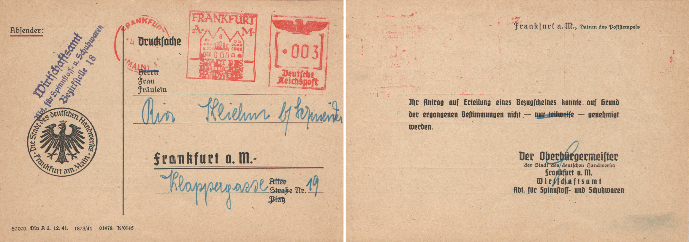 Ab dem 28.8.1939 galt die Bezugsscheinpflicht. Die Dienststelle war untergebracht in der Goetheschule, Hohenzollern-Anlage 24 (heute: Ludwig-Erhard-Anlage). Ablehnung einer Genehmigung zum Kleiderkauf, Februar 1942. Gesendet an die Klappergasse 19. Gesetzt in der Schriftart "Tannenberg"